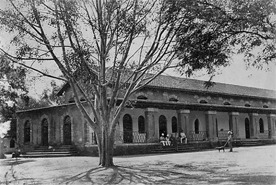 Kamptee, India (1894)